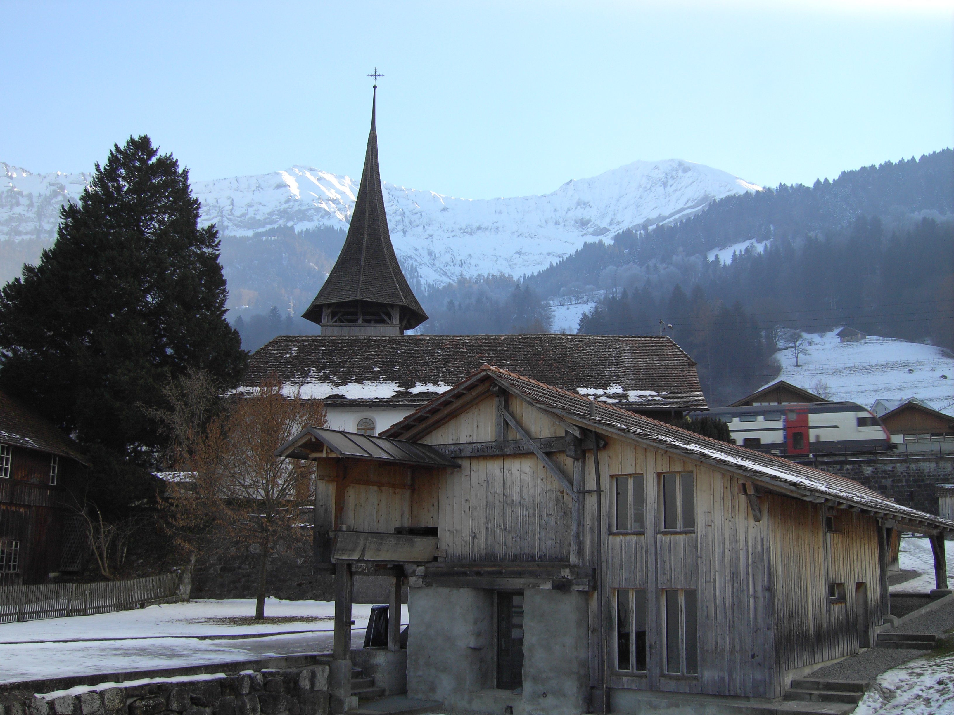 Church and Mill on Leissigen BE in Switzerland